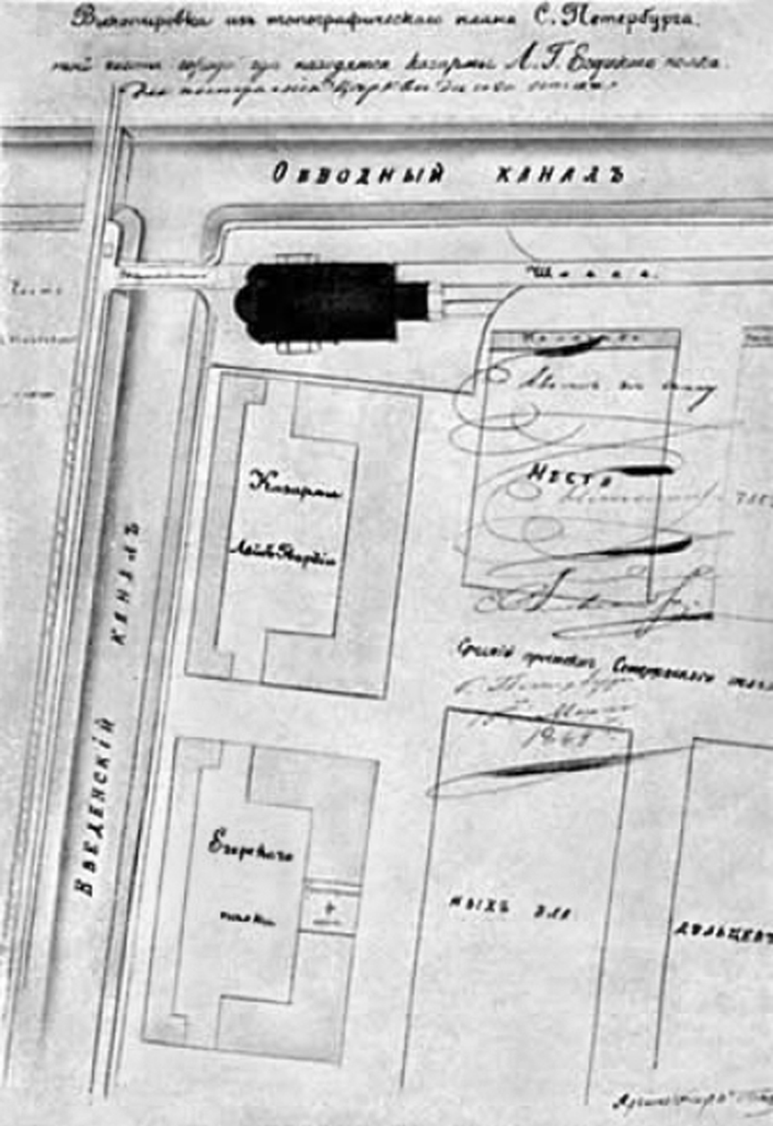 Силуэт церкви св. великомученика Мирония на плане с привязкой к местности.